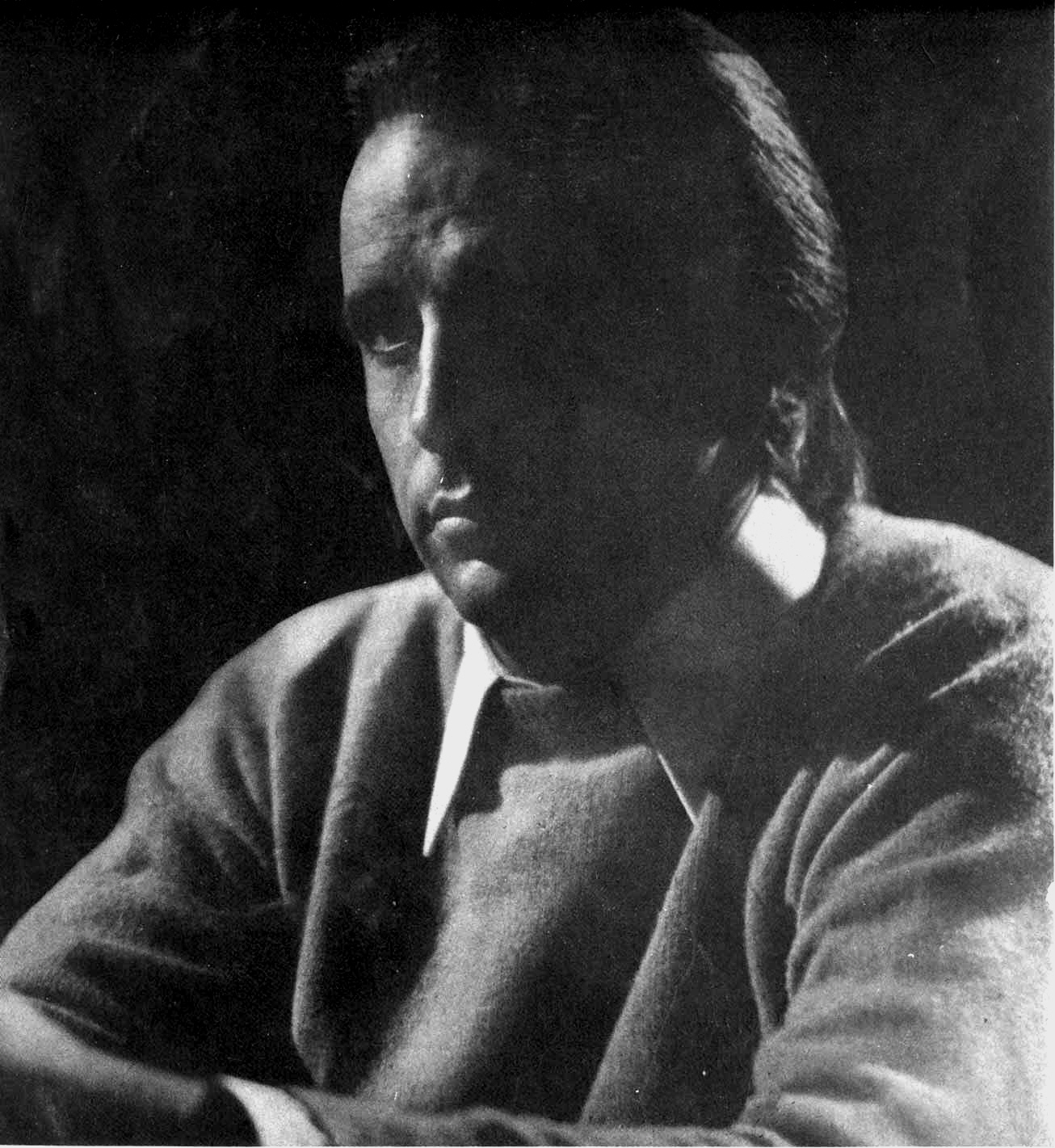 Fotografía del cantante uruguayo Santiago Chalar, tomada en Argentina para el álbum "Una pena y un cariño" editado por CBS-Argentina en 1974.